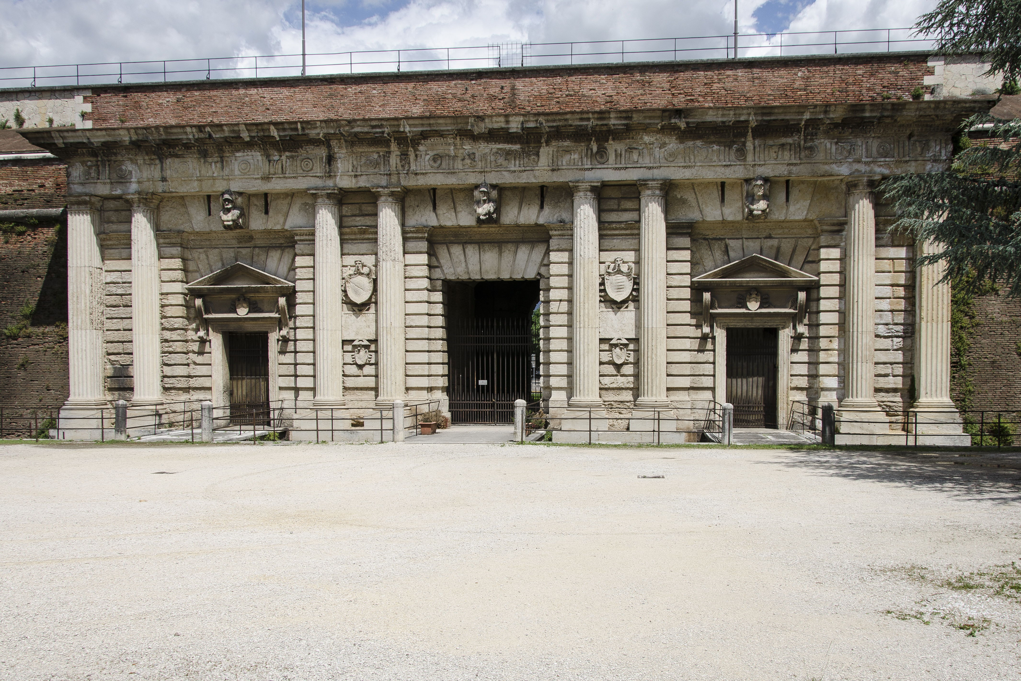 Porta Palio a Verona, opera di Michele Sanmicheli